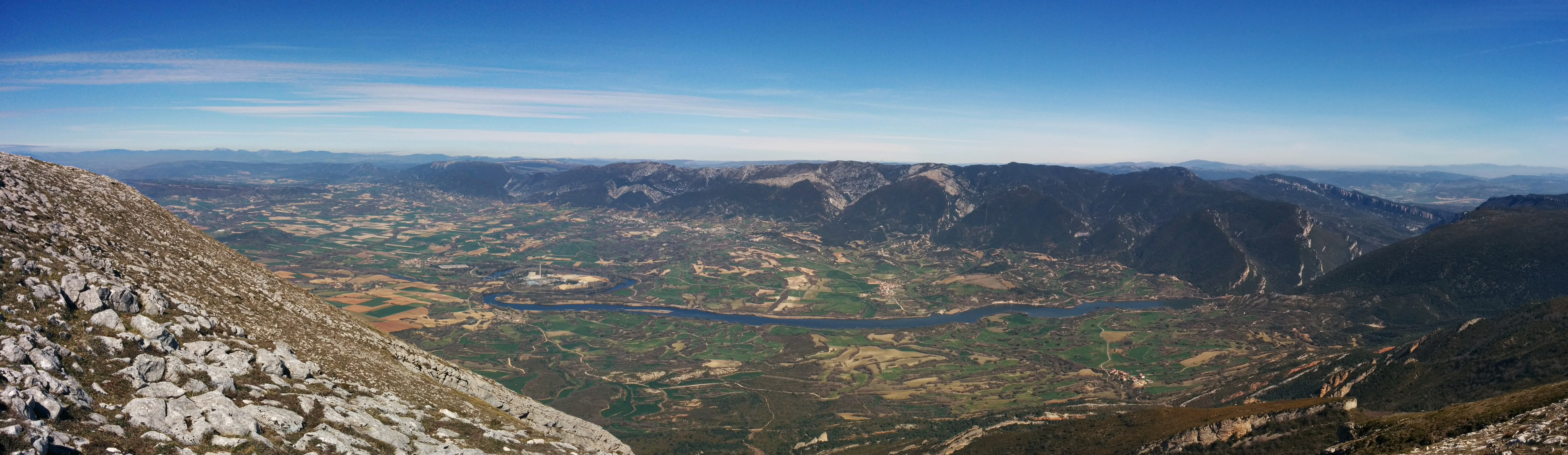 Vista del valle de Tobalina desde el pico Humión, en Burgos.